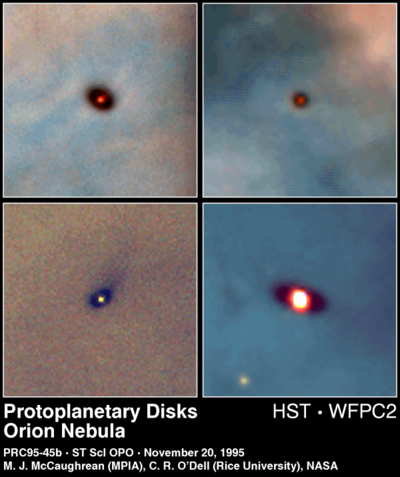 Disques observés en absorption par le HST dans la constellation d'Orion. Responsable scientifiques des observations : Mark McCaughrean Crédit : NASA et Space Telescope Institute. Copyright : HST Copyright